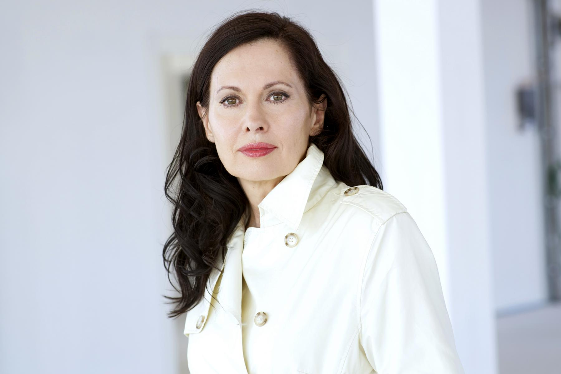 porträt von evelyn engleder